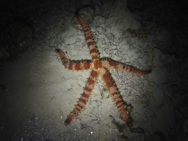 A nail armed sea star (Mithrodia clavigera) seen in Landaagiraavaru, Baa Atoll, Maldives.